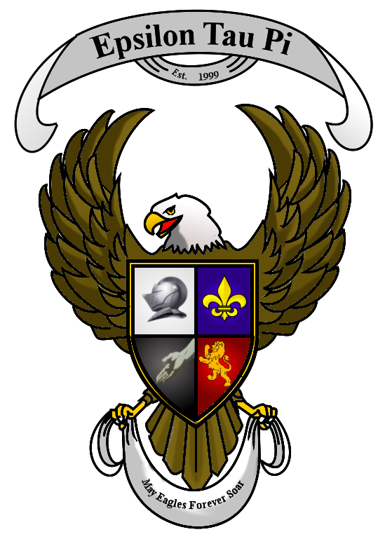 Epsilon Tau Pi image